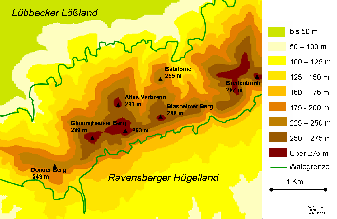 Höhenschichtung der Egge (Wiehengebirge)